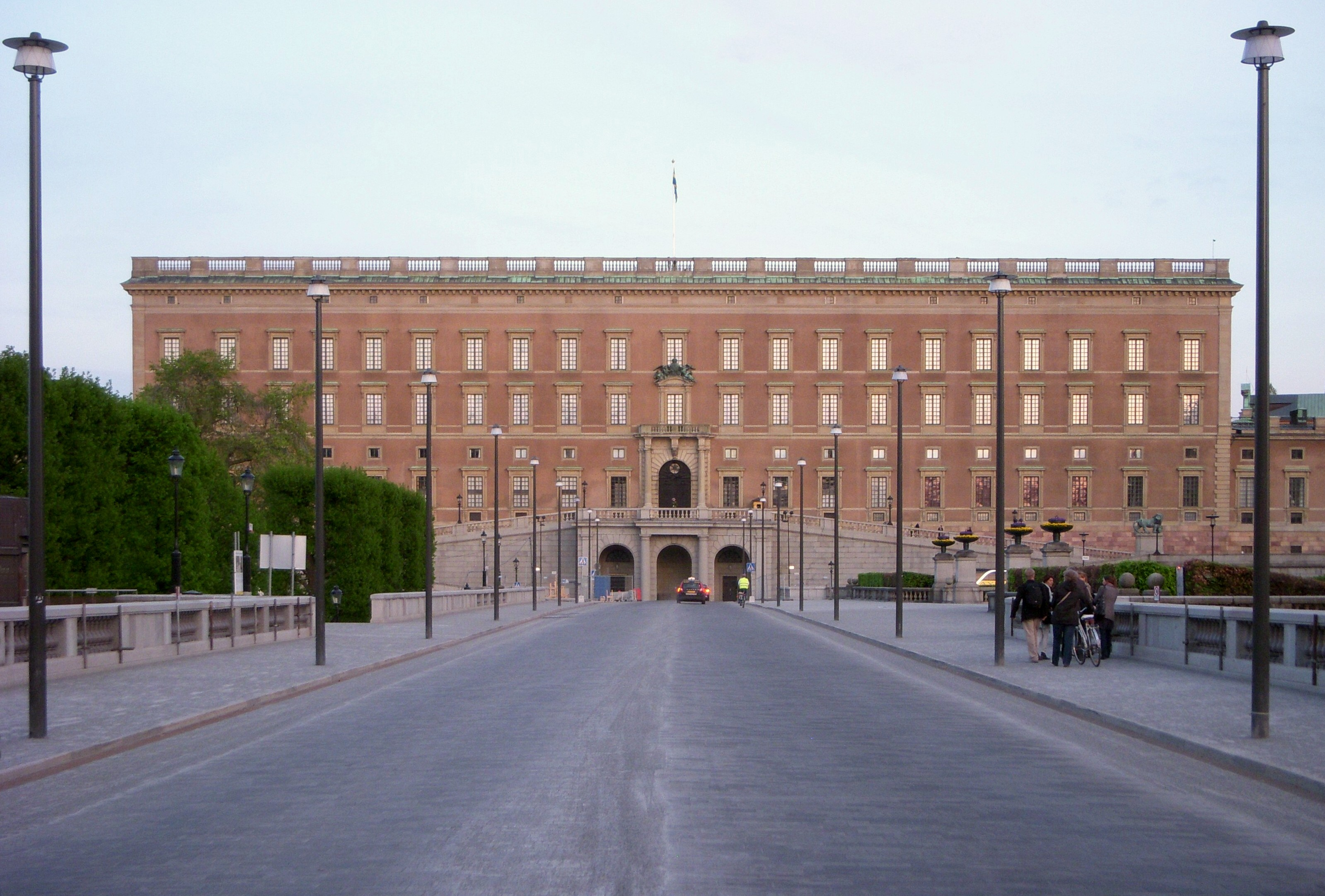 Stockholms slott, fasad mot norr från Norrbro